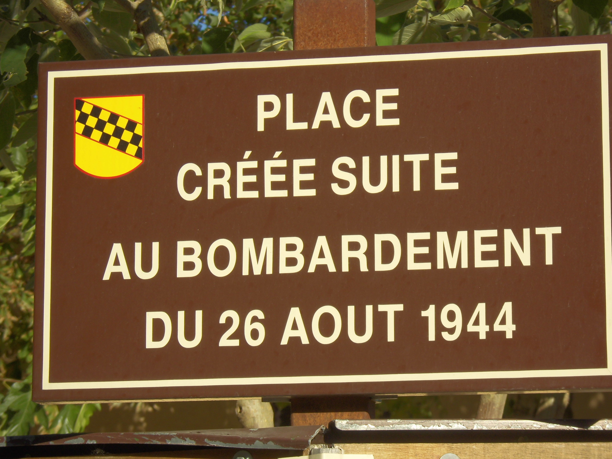 Am Platz an der Grand Rue gegenüber der Kirche erinnert das Schild an die Bombardierung.